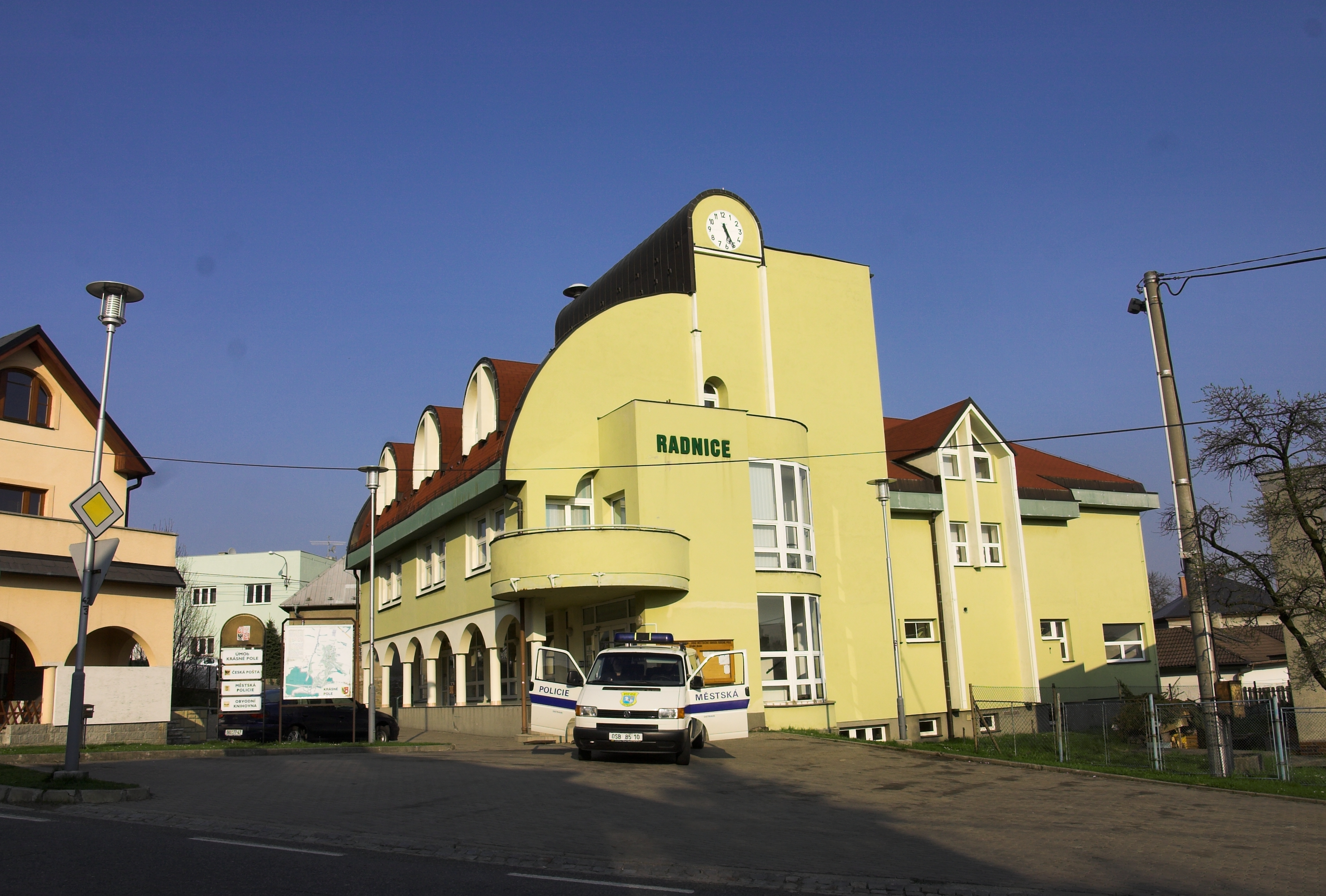 Ostrava-Krásné pole, town hall. April 2009.